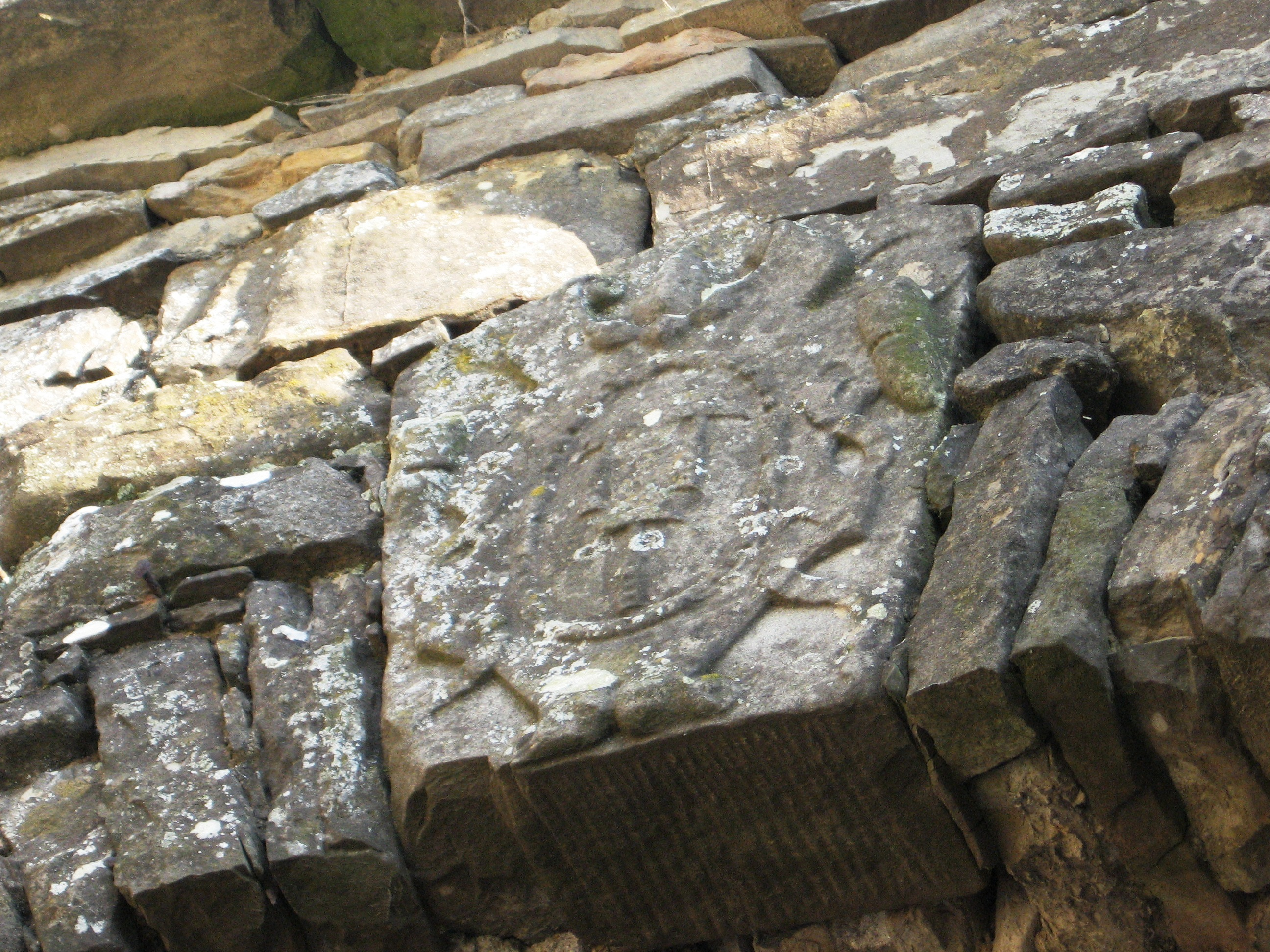 Pezzolo Valle Uzzone - Gorrino. Stemma di fattura barocca con il triplice martello (in dialetto "ponzone") dei Marchesi di Ponzone, sulla Porta Fredda (porta nord)